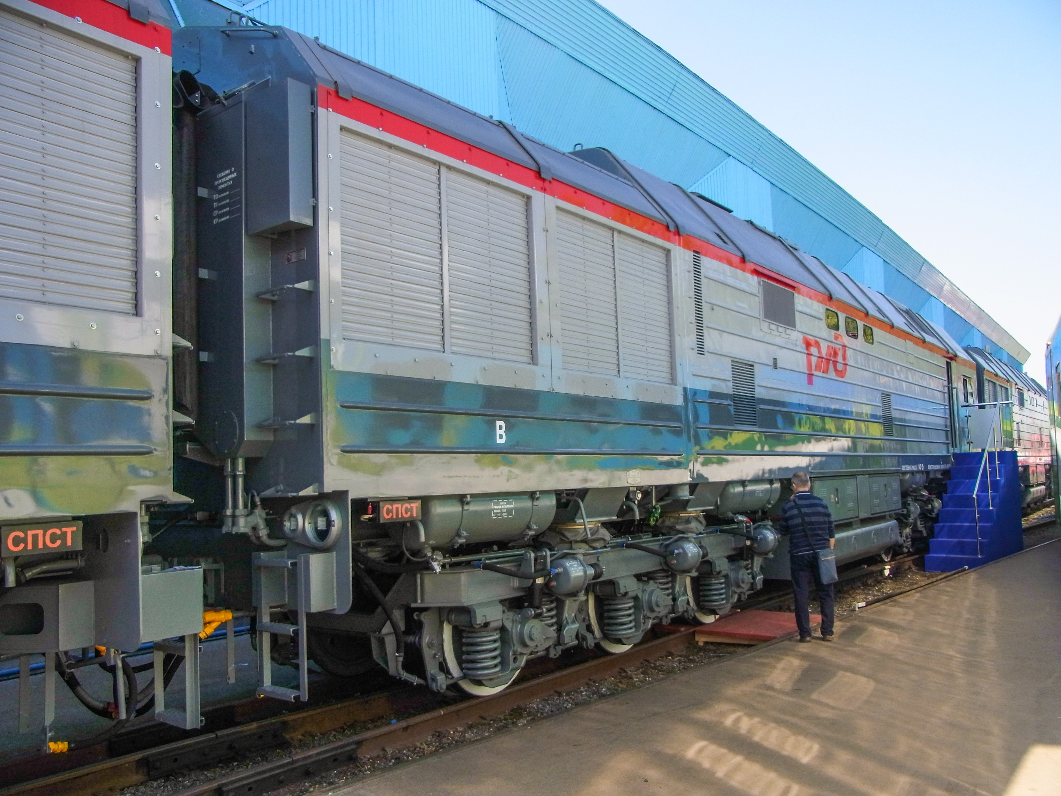 Бустерная секция тепловоза 3ТЭ25К2М-0001